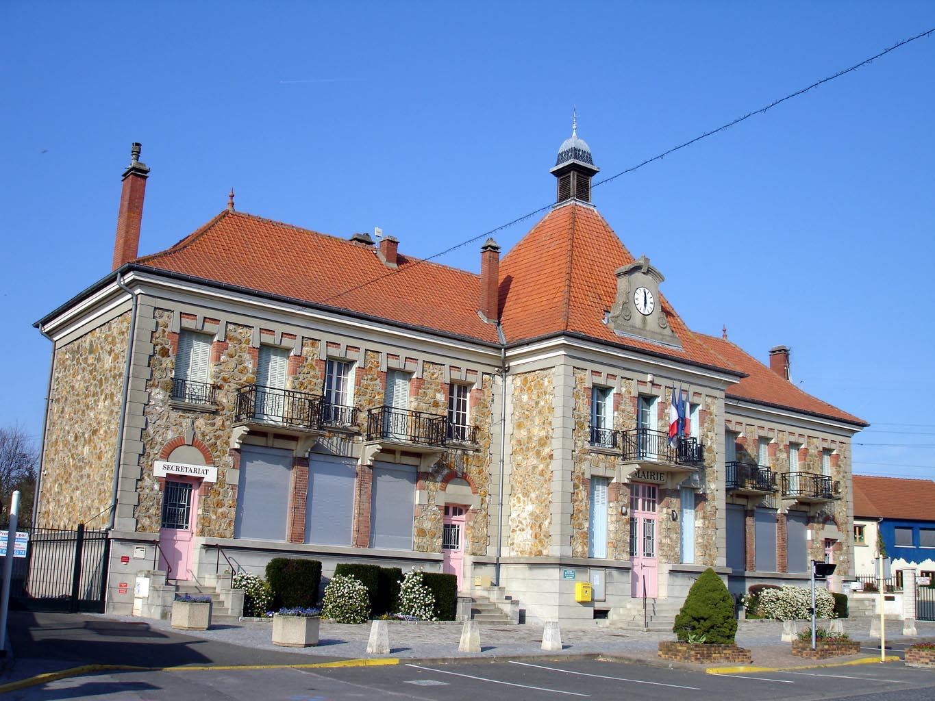 Hotel-de-Ville du Pin (Seine-et-Marne), France